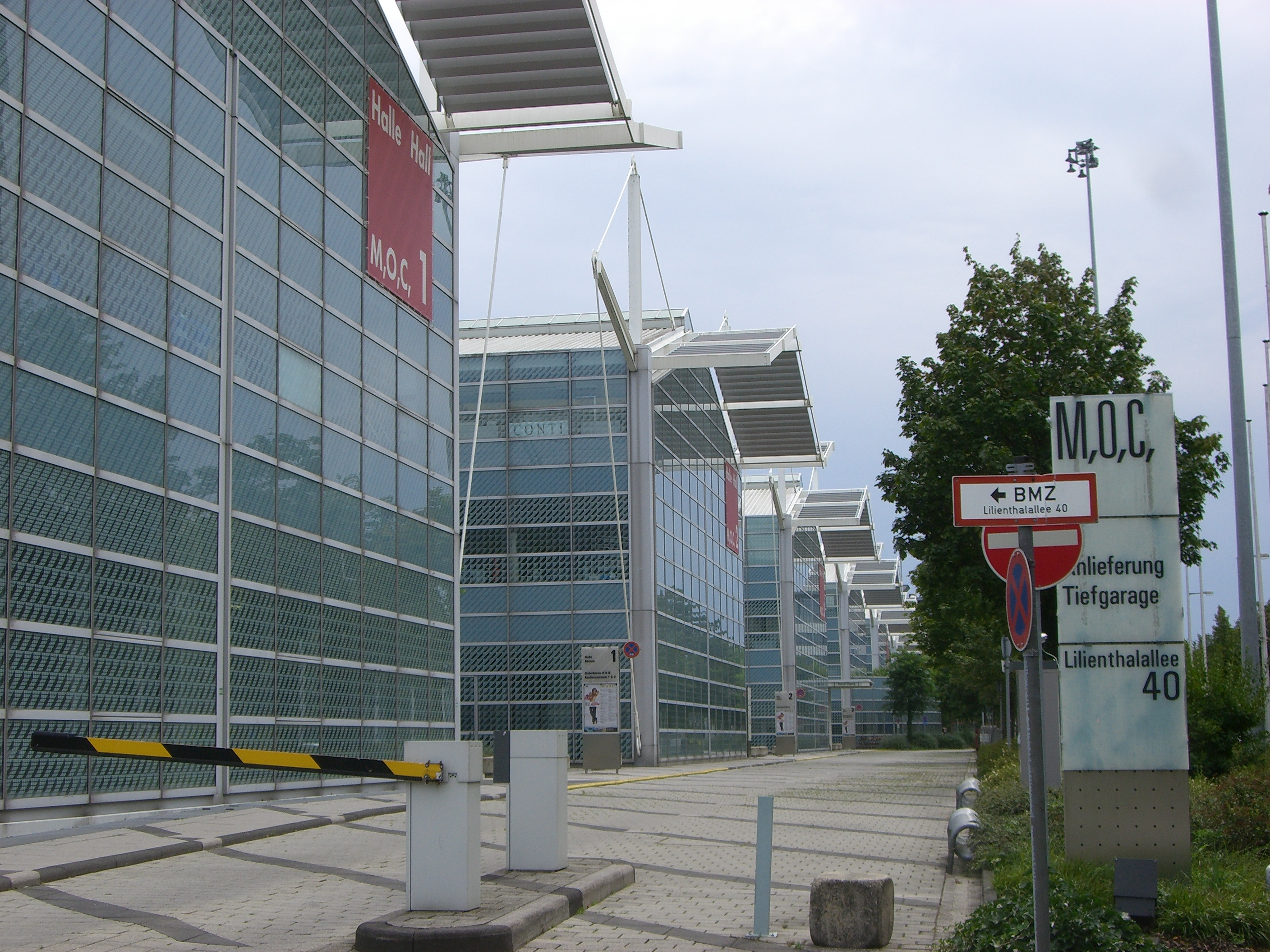 München - MOC (Westfassade).jpg